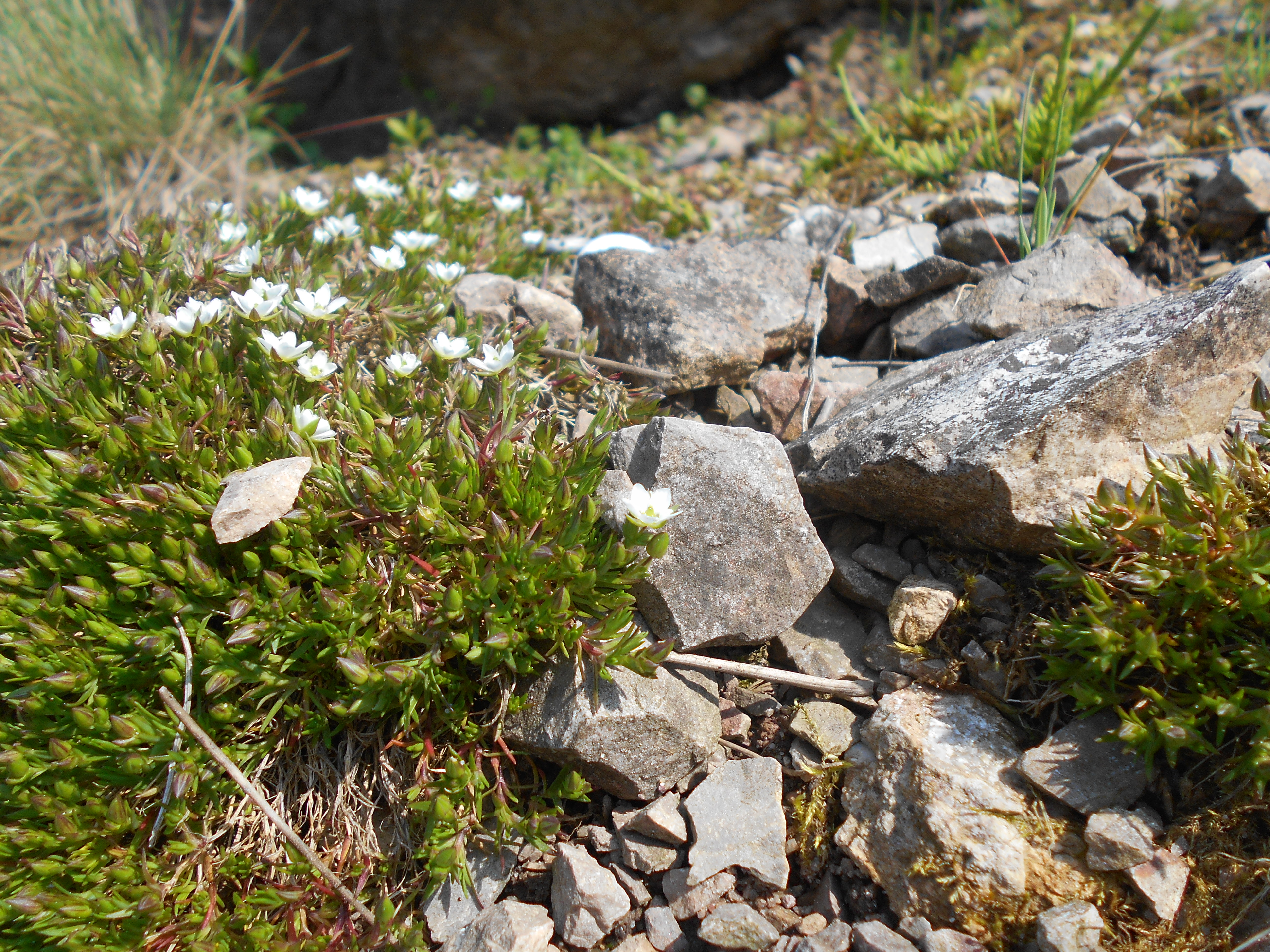 Mokrzyca wiosenna (Minuartia verna), Ogród Botaniczny PAN w Warszawie.